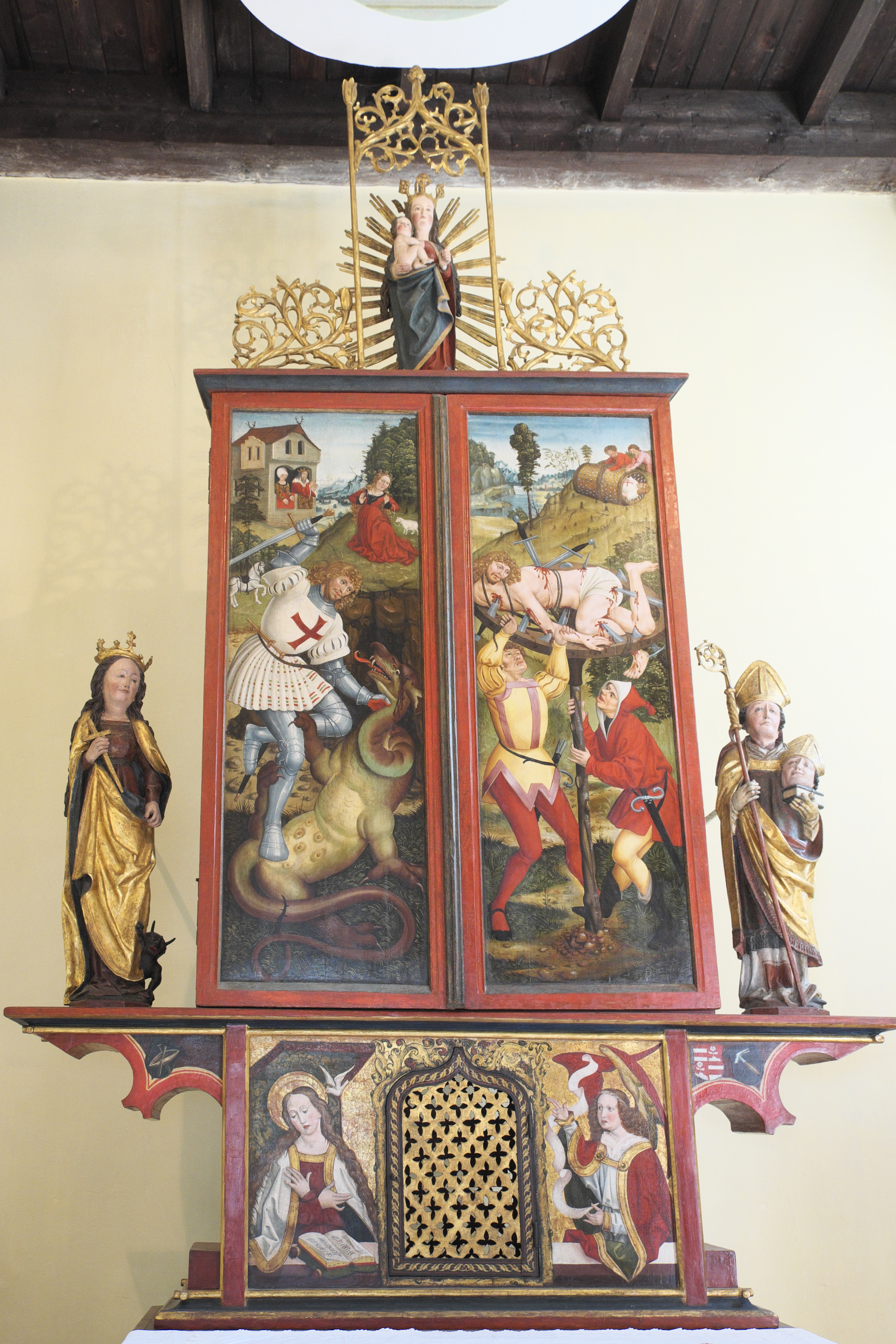 Alt St. Georg in Milbertshofen im Stadtbezirk Milbertshofen-Am Hart in München (Bayern/Deutschland), Georgsaltar von 1510; geschlossener Zustand (Werktagsseite)